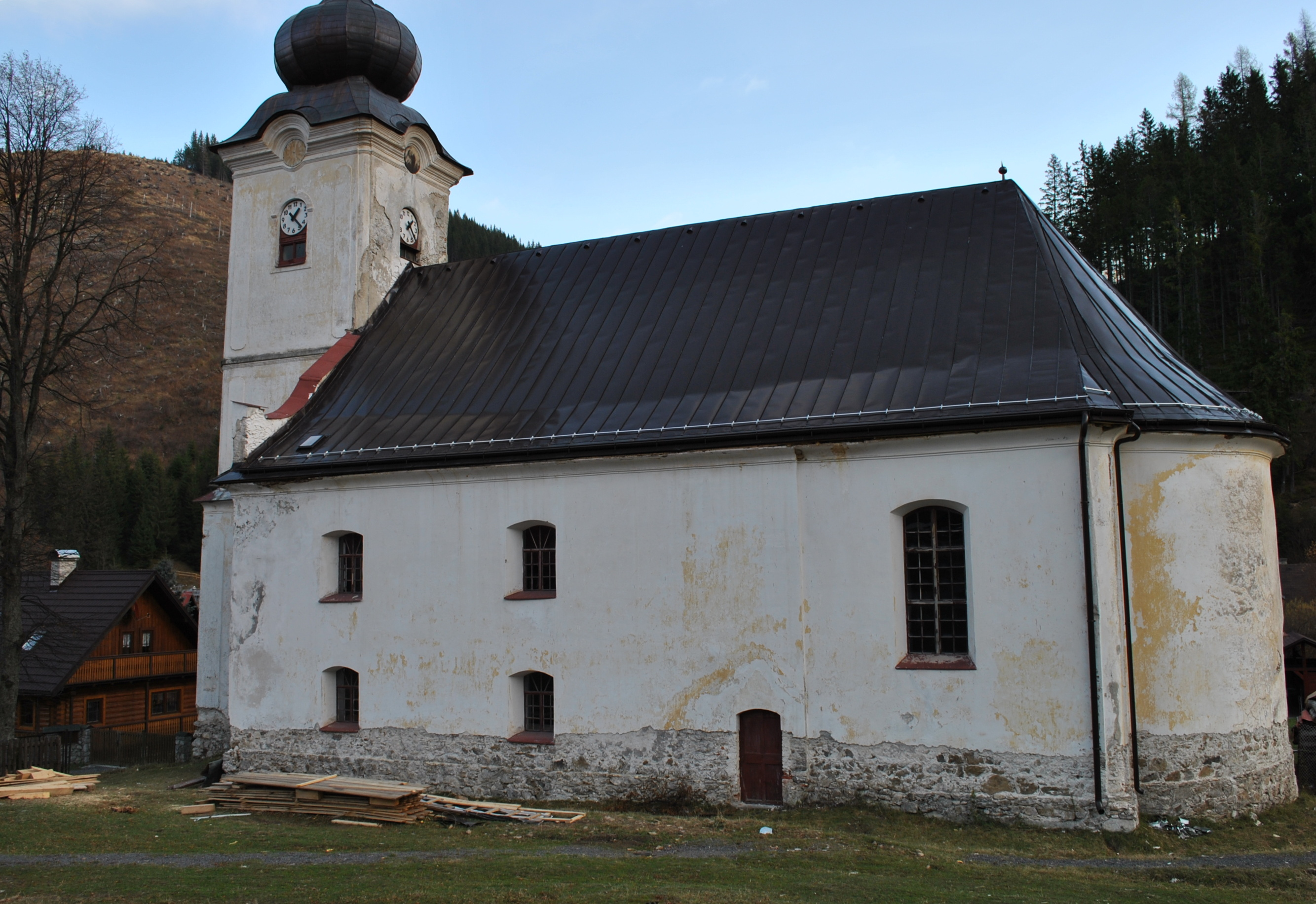 Evanjelický kostol vo Vyšnej Boci, okres Liptovský Mikuláš